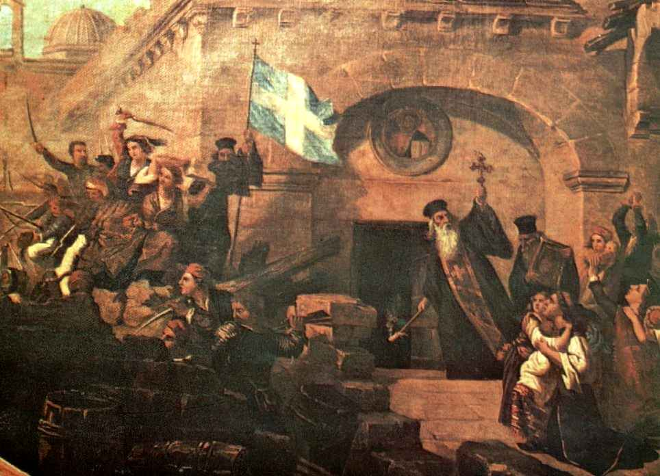 Arkadi carnage. 1866